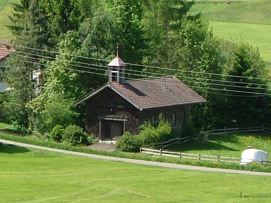 Bachtels St.Ulrich Holzkirche